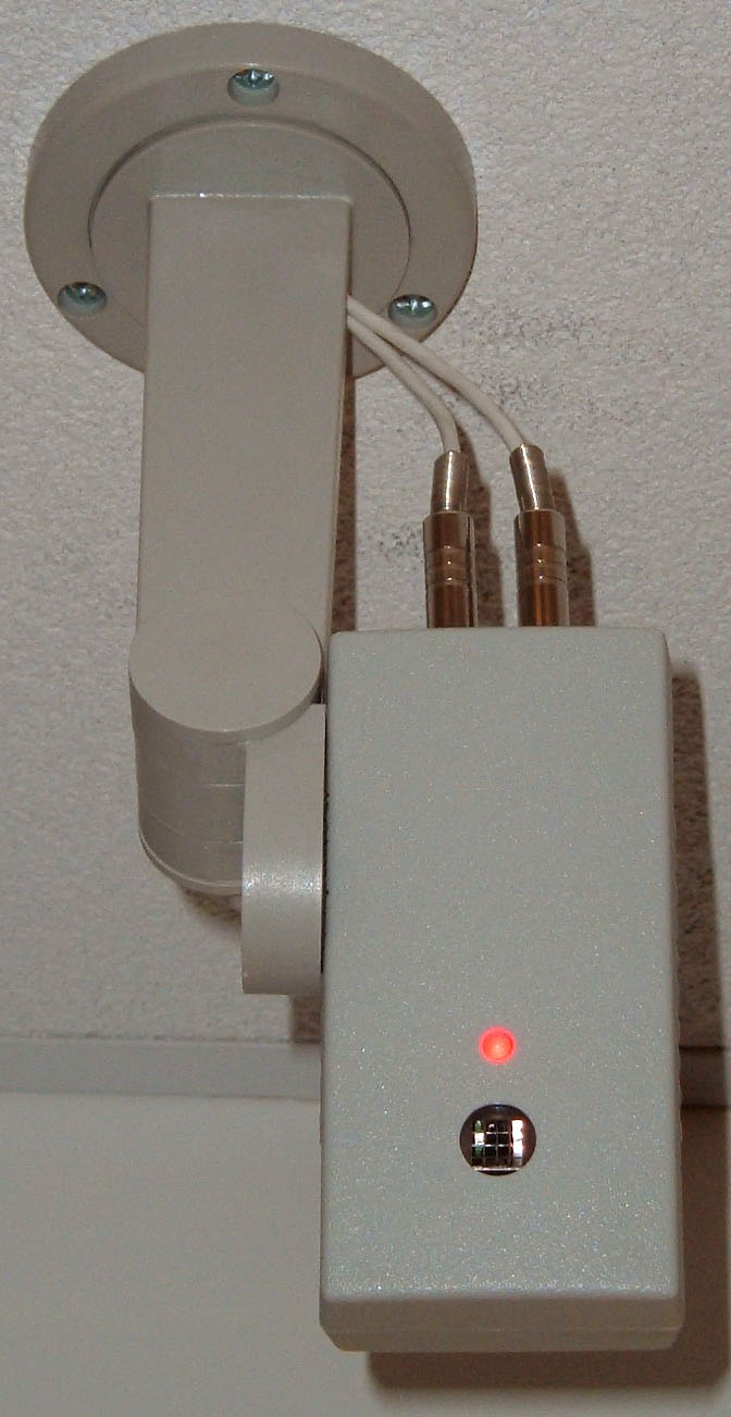 PRS Receiver